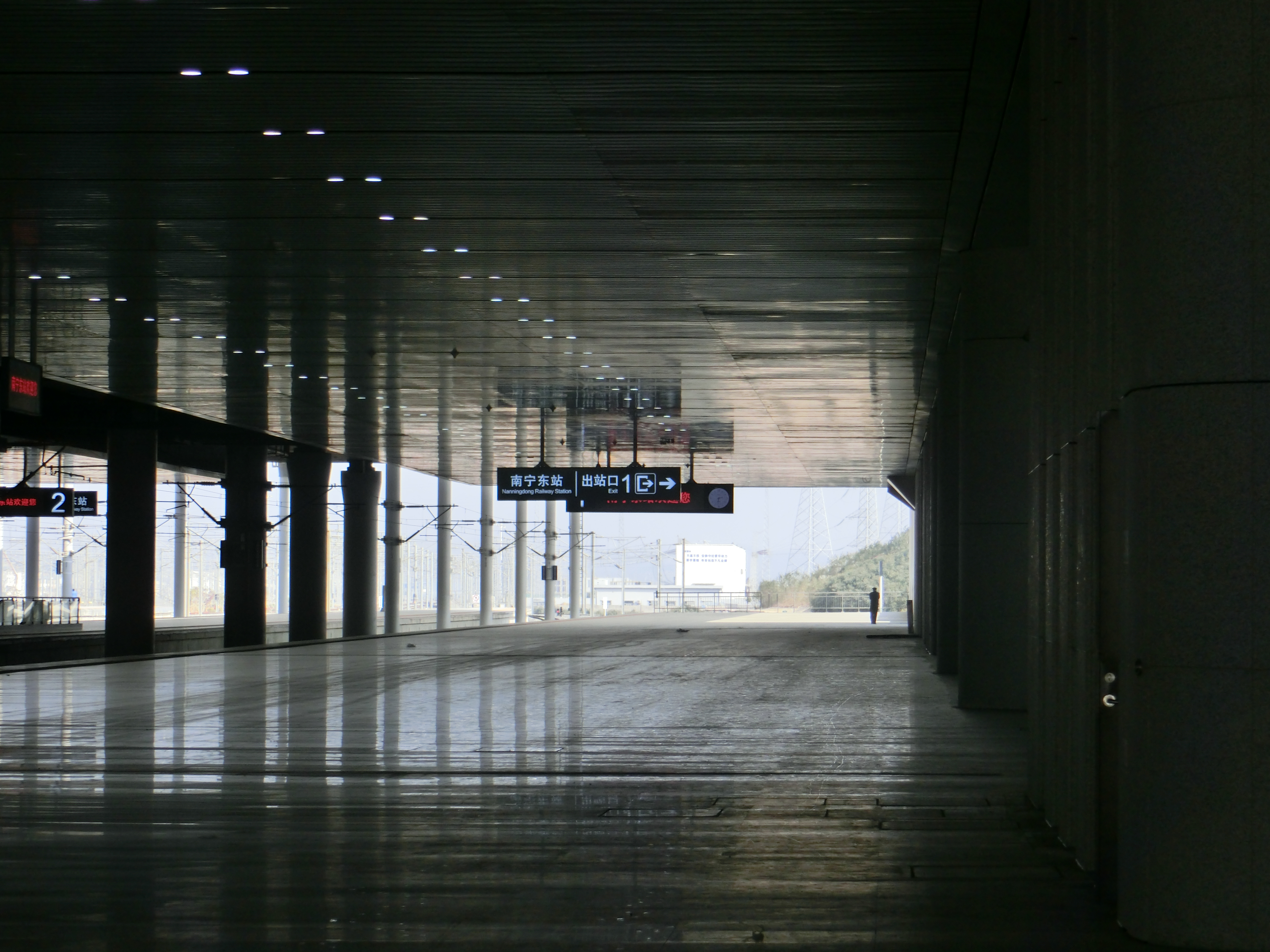 南宁东站一站台